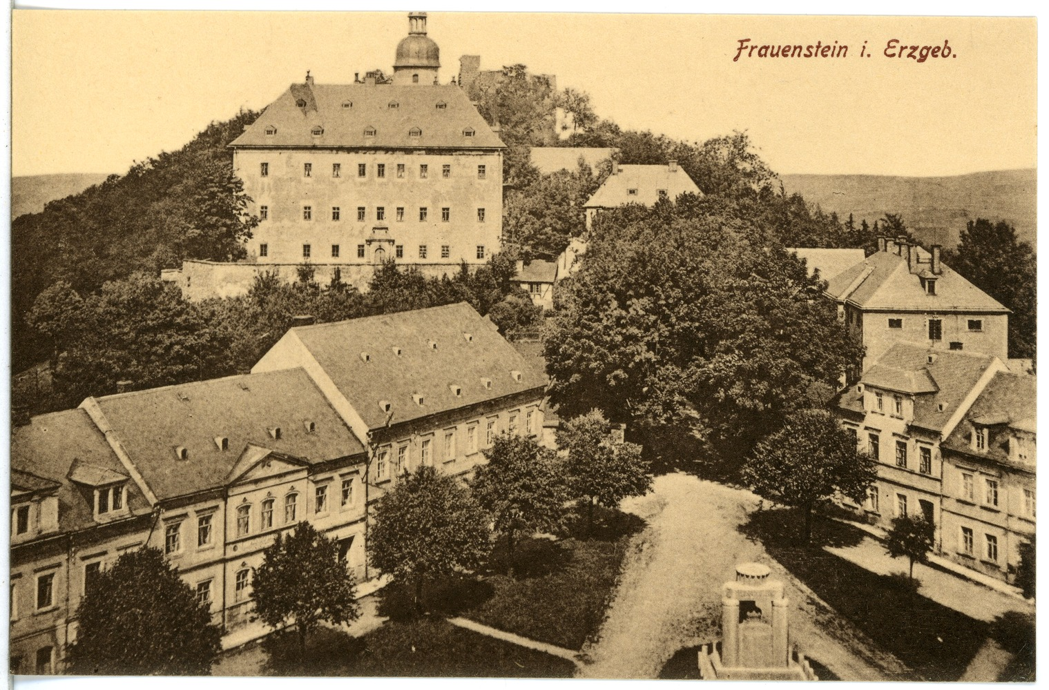 Frauenstein; Schloß This postcard is from publisher Brück & Sohn in Meißen ( postcard has a unique number 21037 and is available in a higher resolution at the publisher. This images was uploaded in a cooperation project between Wikipedians and the publisher.